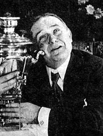 Антон Фертнер (Antoni Fertner), польский актёр, играл роль в русском фильме «Антошу корсет погубил» (1916).